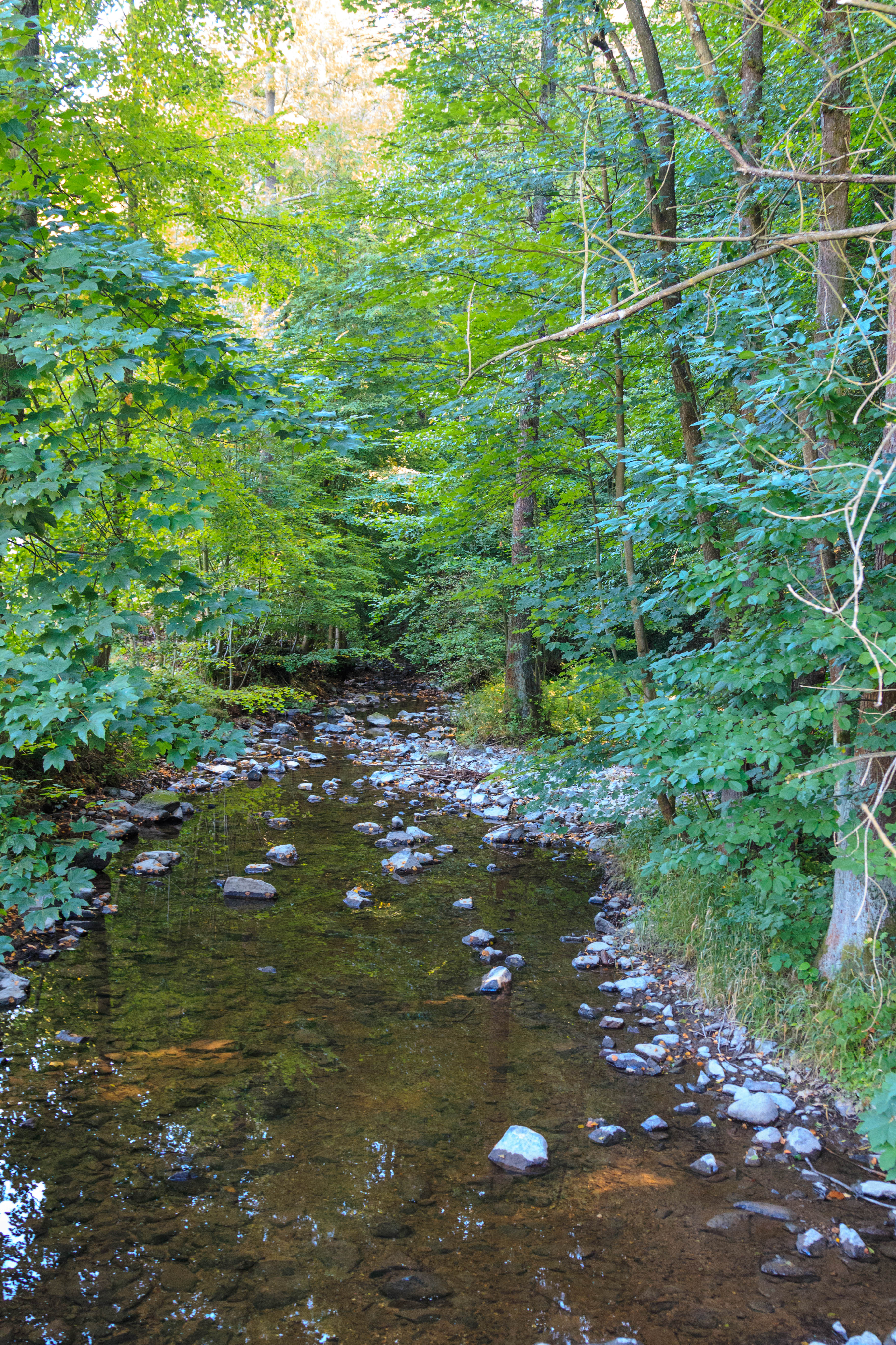 PP Podskala Project: Chráněná území